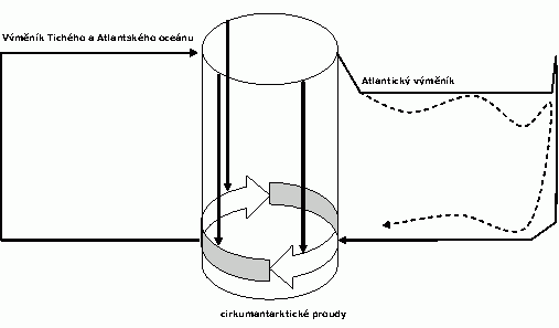 Jednoduchý náčrtek přibližující fungování termohalinního výměníku. Obrázek zpracován dle podobného náčrtku RNDr. Václava Cílka z jeho článku Dialog mezi mořem a větrem, který vyšel v 77. čísle časopisu Vesmír.